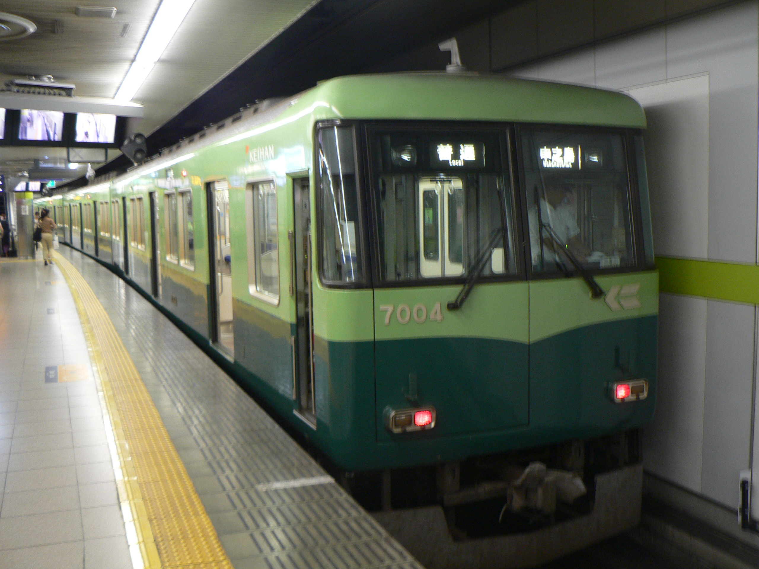 京阪7000系の旧6000系編入車。